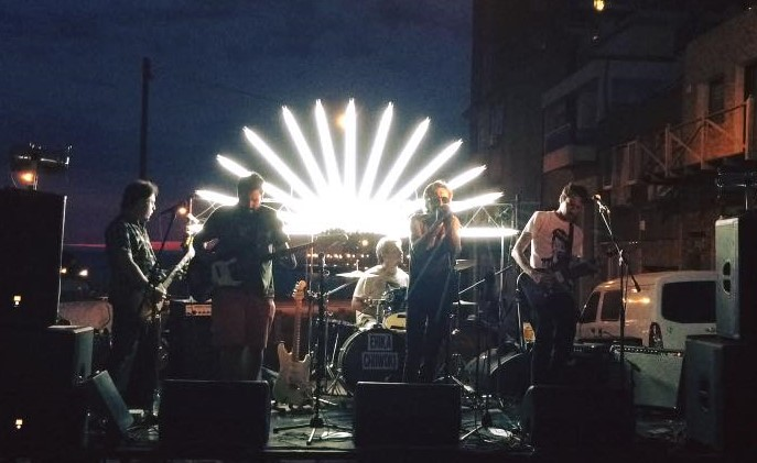 Erika Chuwoki en vivo en el Peach an Convention 5